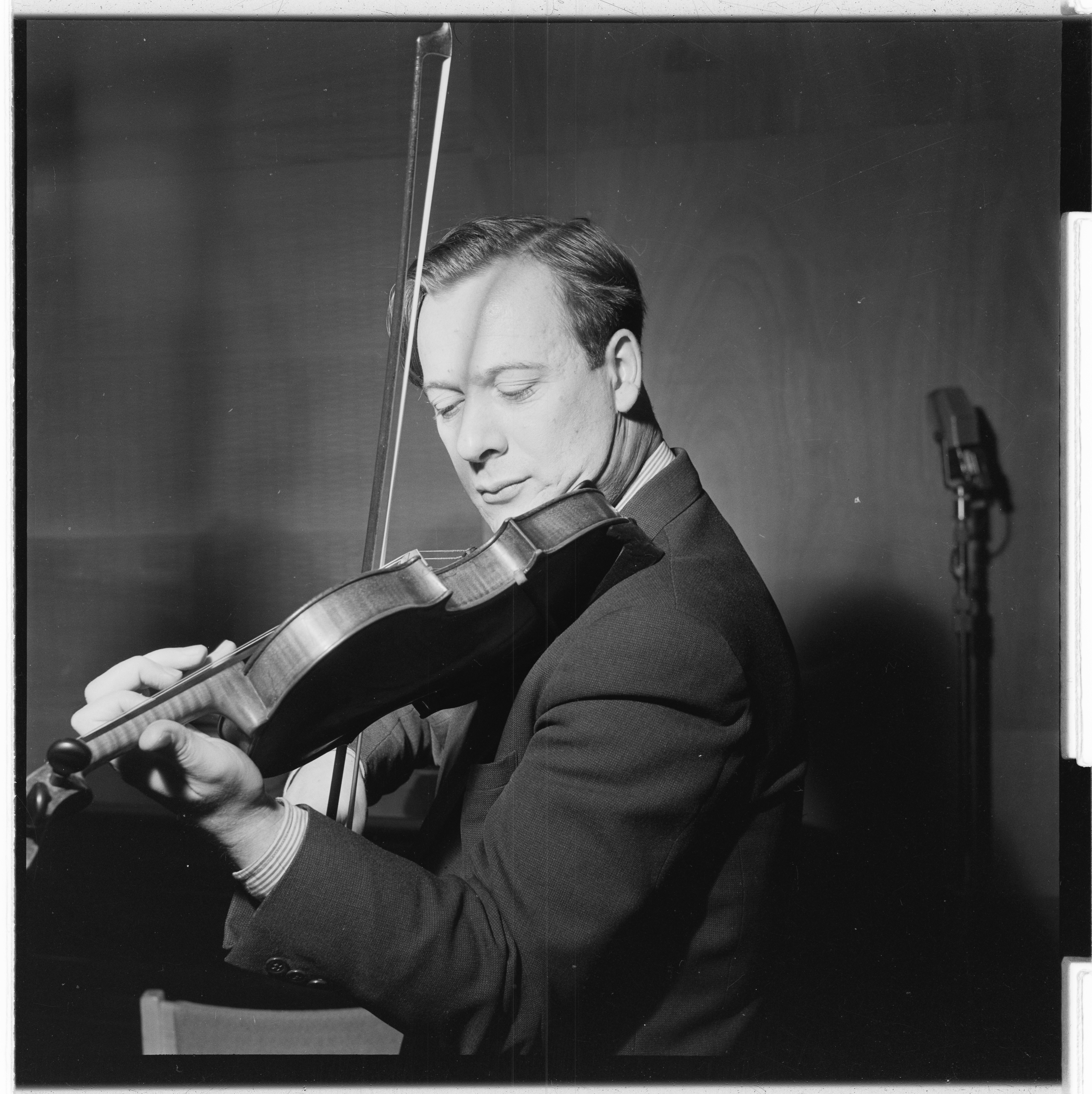 Bildet er hentet fra Arkivverket. Stavanger-ensemblet. NÅ nr. 3 Arkivinstitusjon : Riksarkivet Arkivnavn : Billedbladet NÅ Sted : Norge, Rogaland, Stavanger, Emneord: Ensembler, Musikere Avbildet